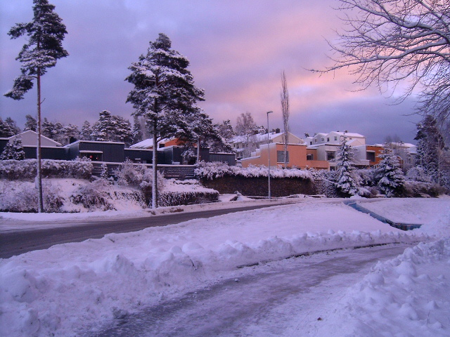 Hellemyrtoppen